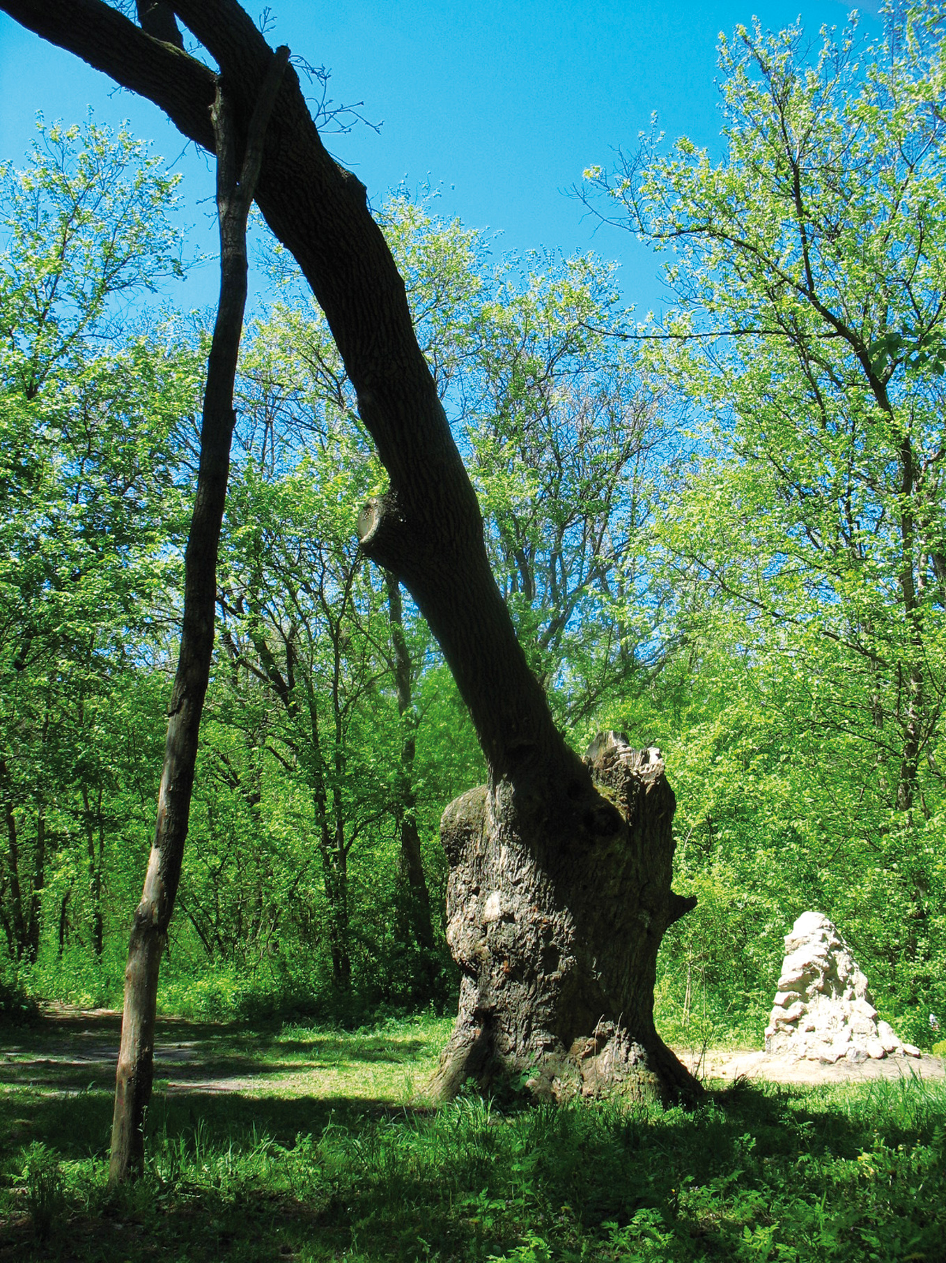 Дуб Махна у Дібрівському лісі (після підпалу, остання жива гілка)